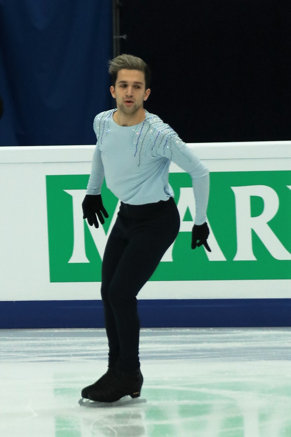 Бурак Демирбога (Турция) на Чемпионате Европы по фигурному катанию 2018.